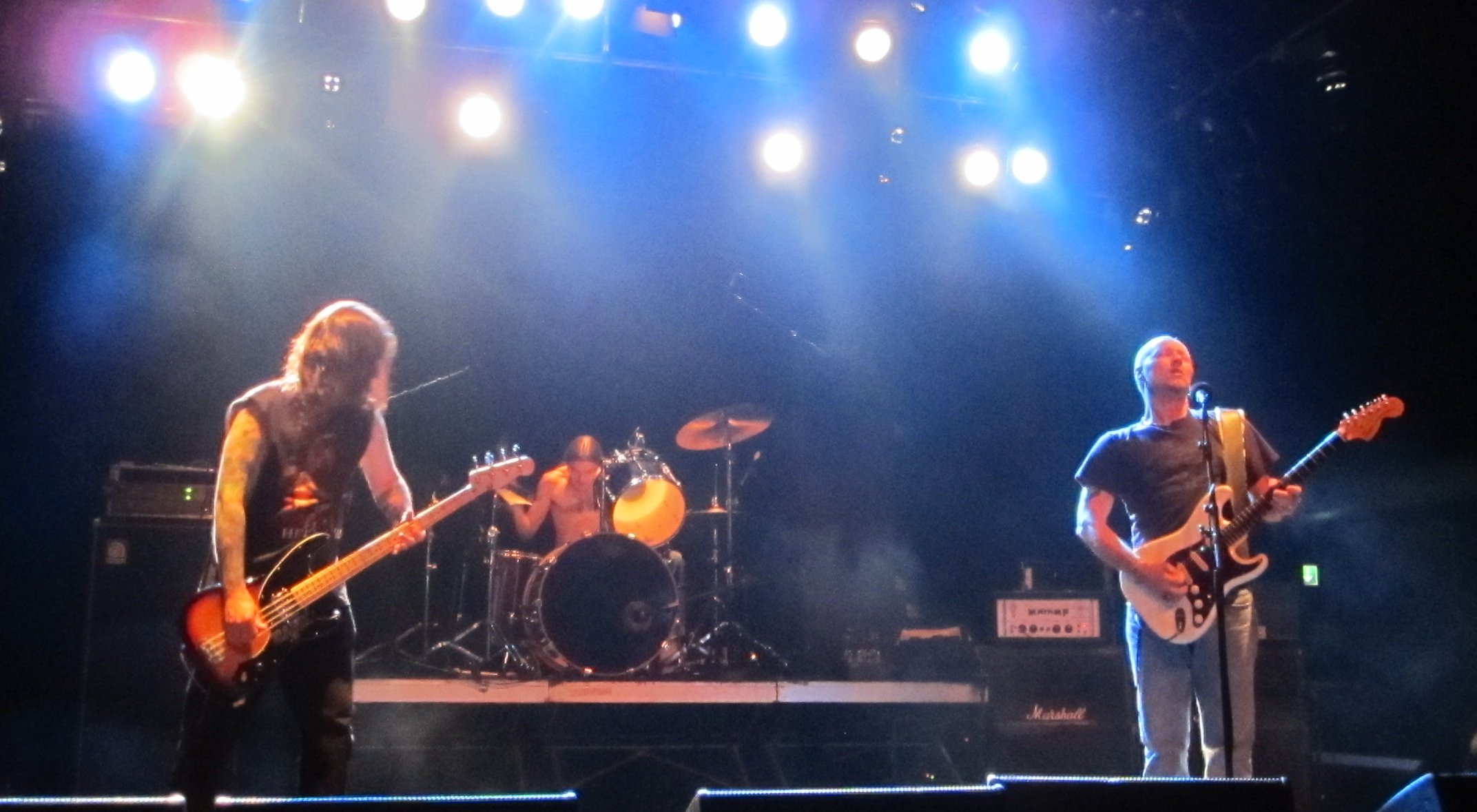 Sons Of Otis